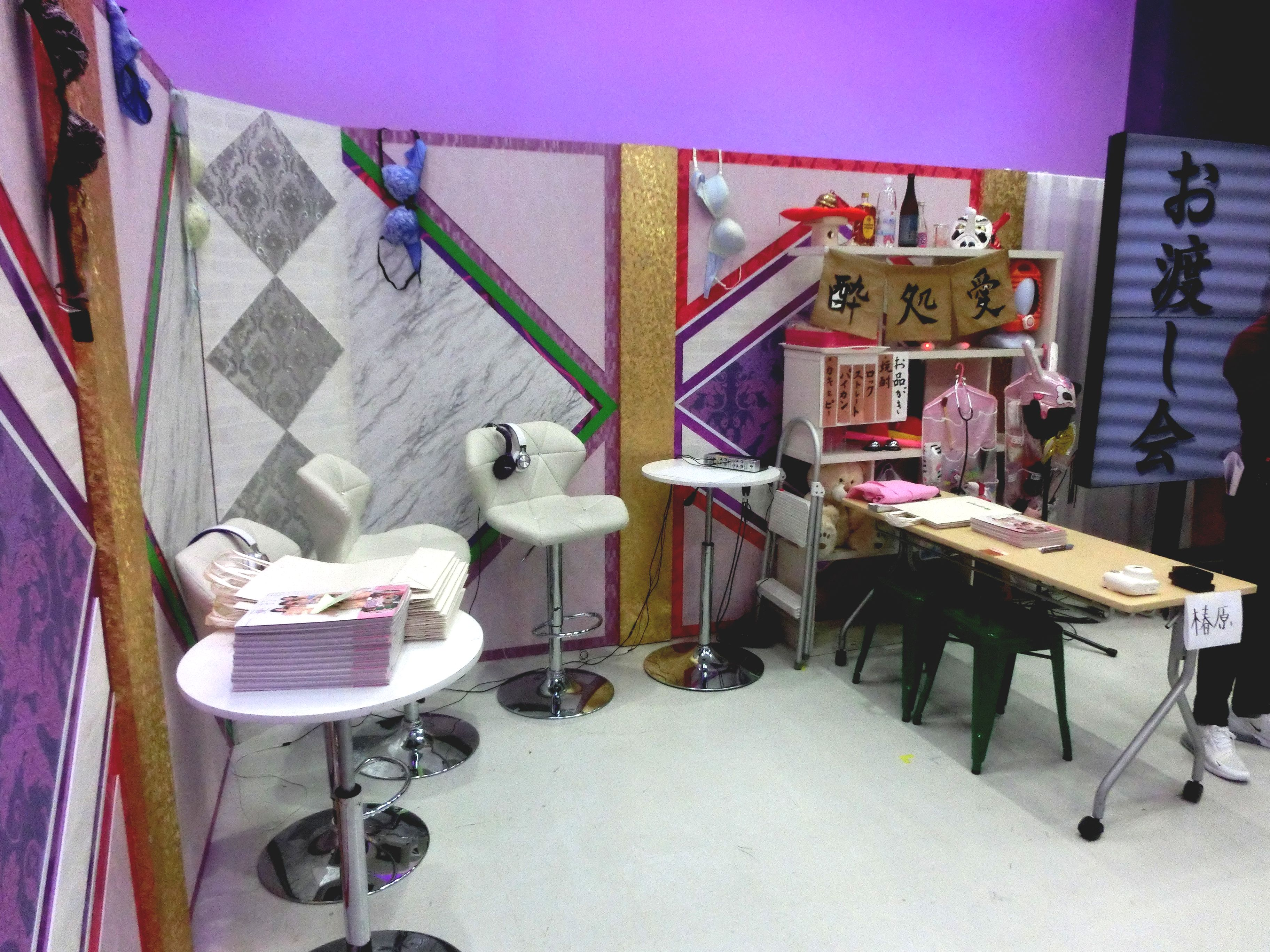 Chateau Ameba 妄想マンデー写真集お渡し会セット